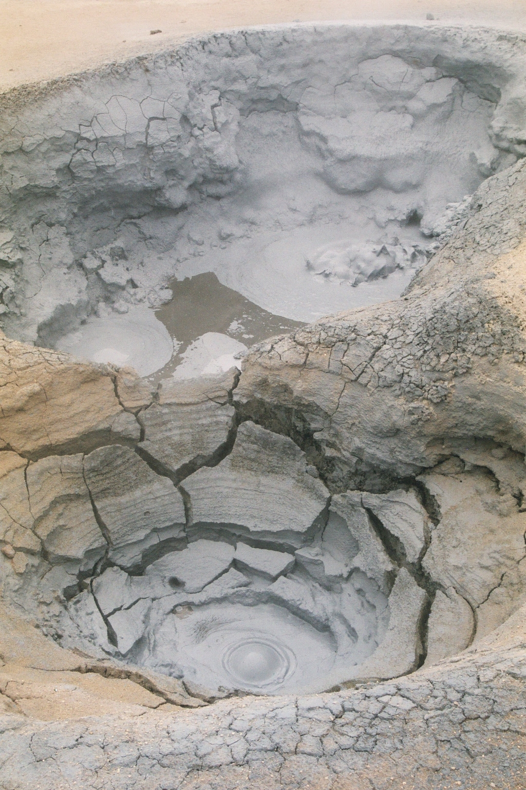 Une marmite de boue sur le site de Námafjall, en Islande. La photographie a été prise en juillet 2004 par Johann Dréo (nojhan) pas loin de l'entrée du site, à côté du parking. Taille de l'image : 1536 x 1024, photographie numérisée à partir d'une pellicule argentique.